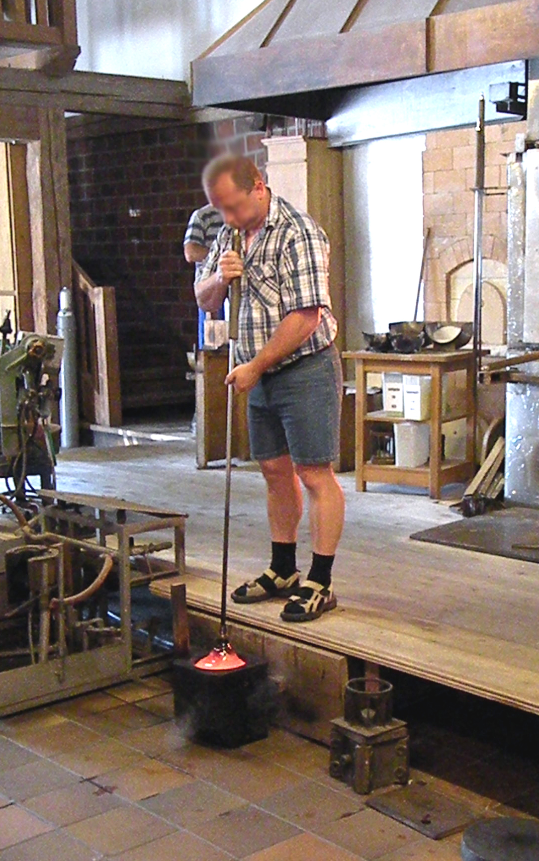 Демонстрация работы стеклодува. Музей стекла в Аребруке.